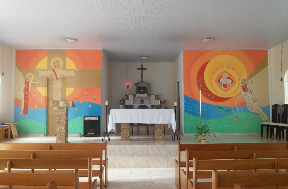 Interior da Igreja Bom Jesus - Água Branca de Minas